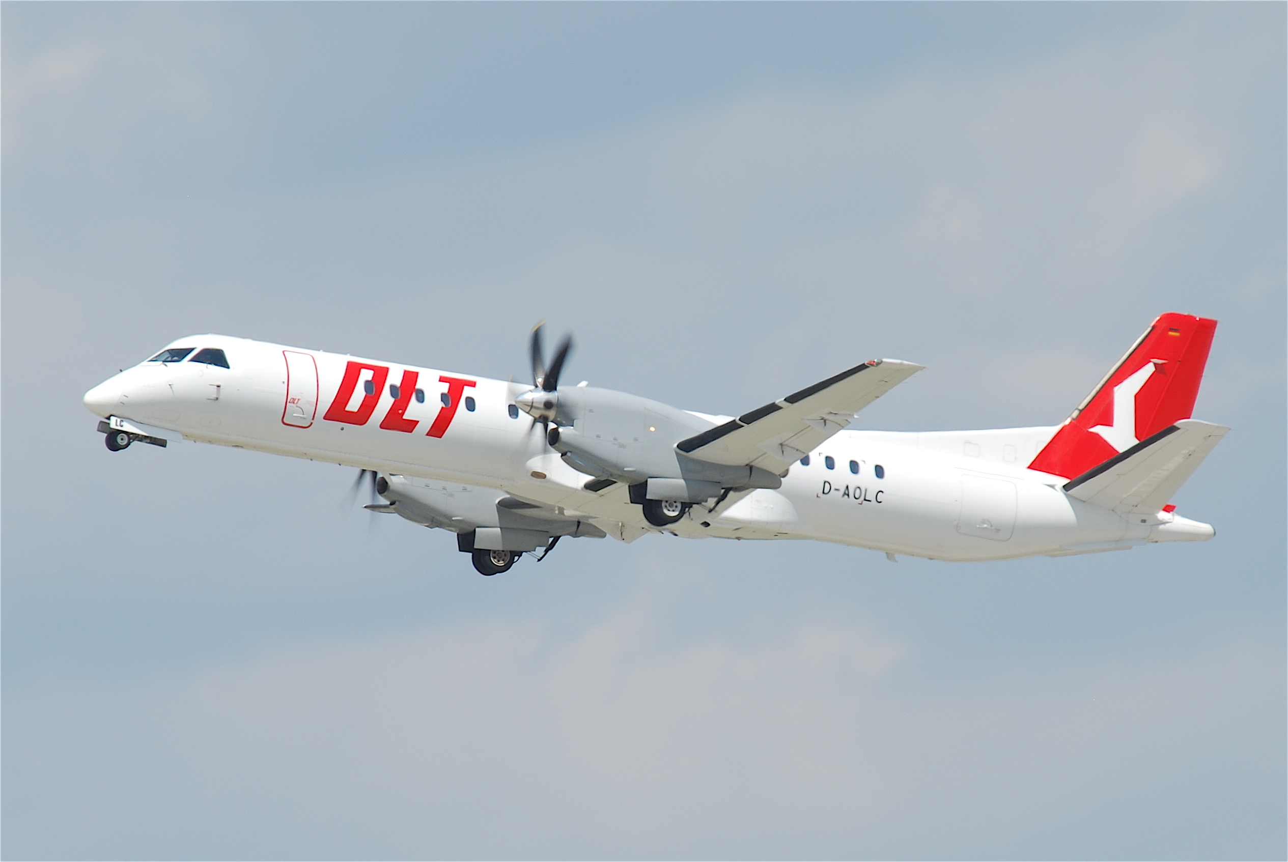 OLT Saab 2000; D-AOLC@ZRH;02.07.2011/602bv